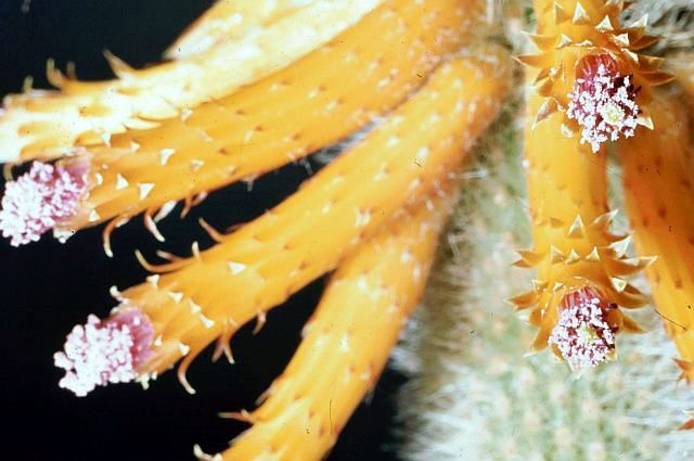 Cleistocactus flavescens